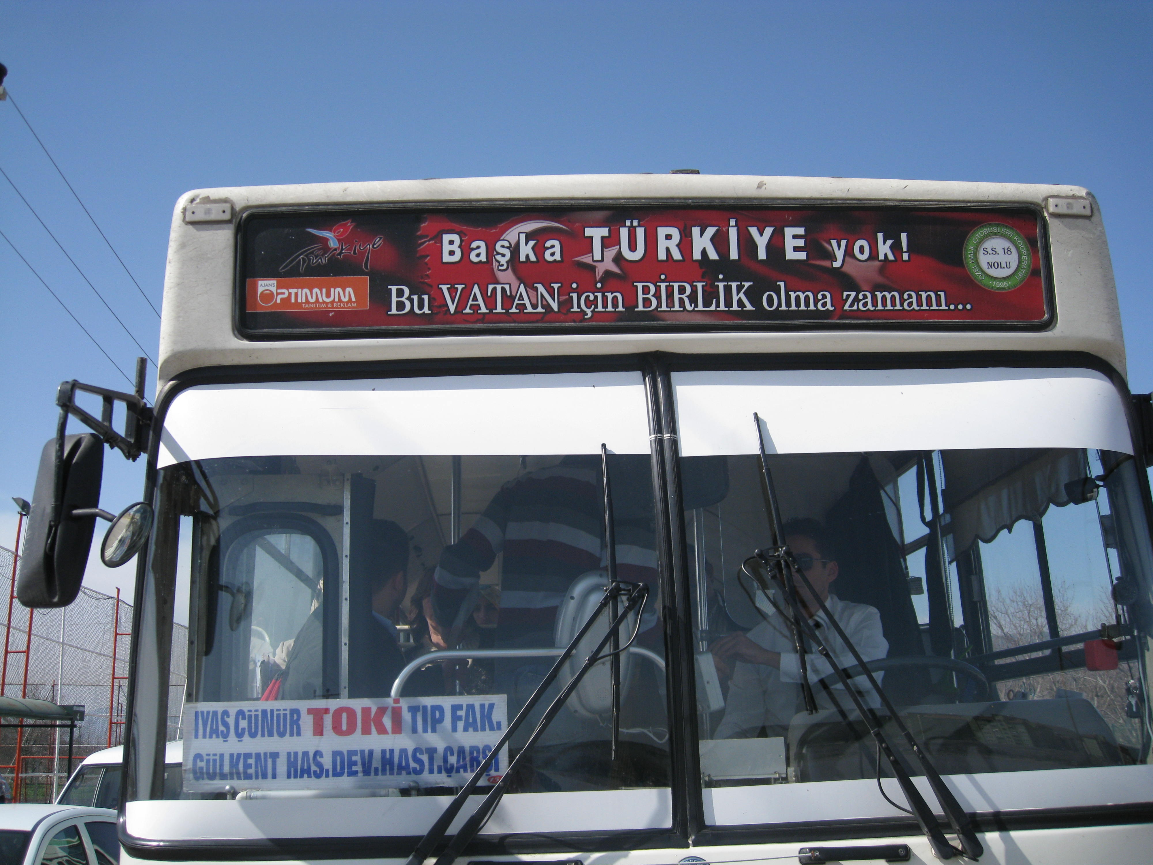 Автобустағы жарнама